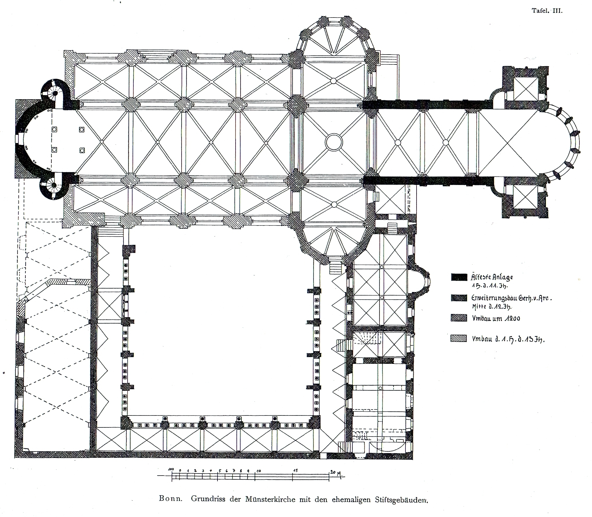 Bonner Münster